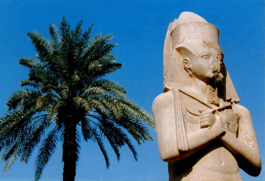 Beschreibung: Statue Pinudjem I im Karnak Tempel von Luxor